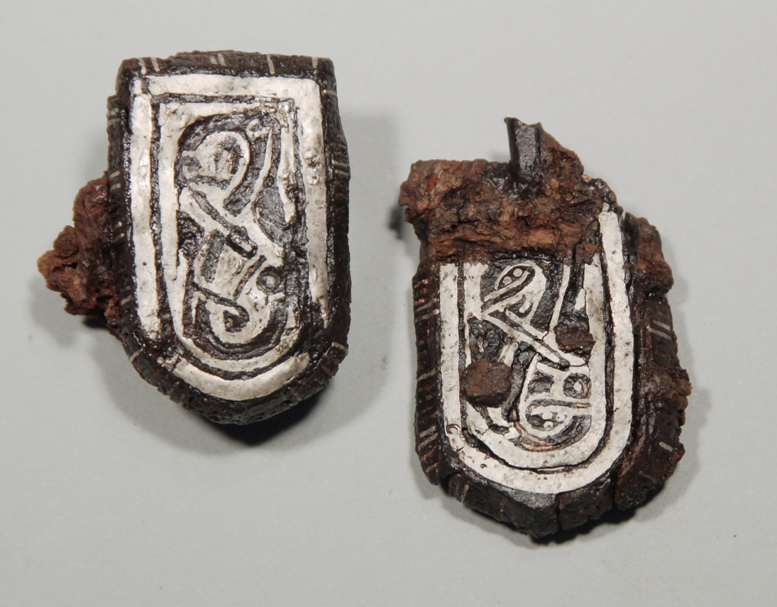 Zwei Nebenriemenzungen einer durch Tauschierung in Tierstilmotiven verzierten, vielteiligen Gürtelgarnitur aus Aschheim (7. Jahrhundert)